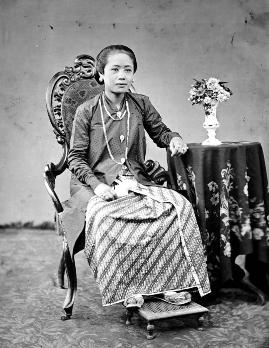 Negatief. Raden Ajoe uit Midden-Java.